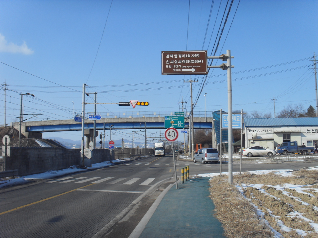 내판리 진입로인 내판로 입구